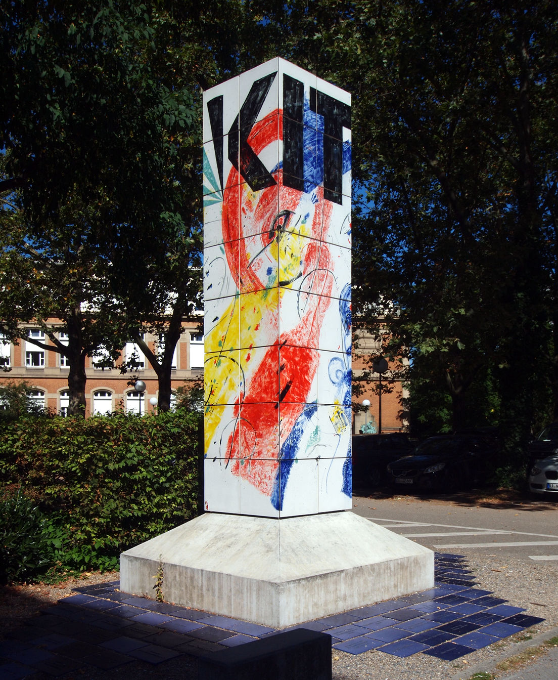 KIT ICON von Joachim Czichon, ein Kunstwerk auf dem Campus Süd des Karlsruher Instituts für Technologie. Realisiert mit der Staatlichen Majolika Manufaktur Karlsruhe.